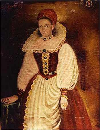 Erzsébet Báthory licence : Bathory